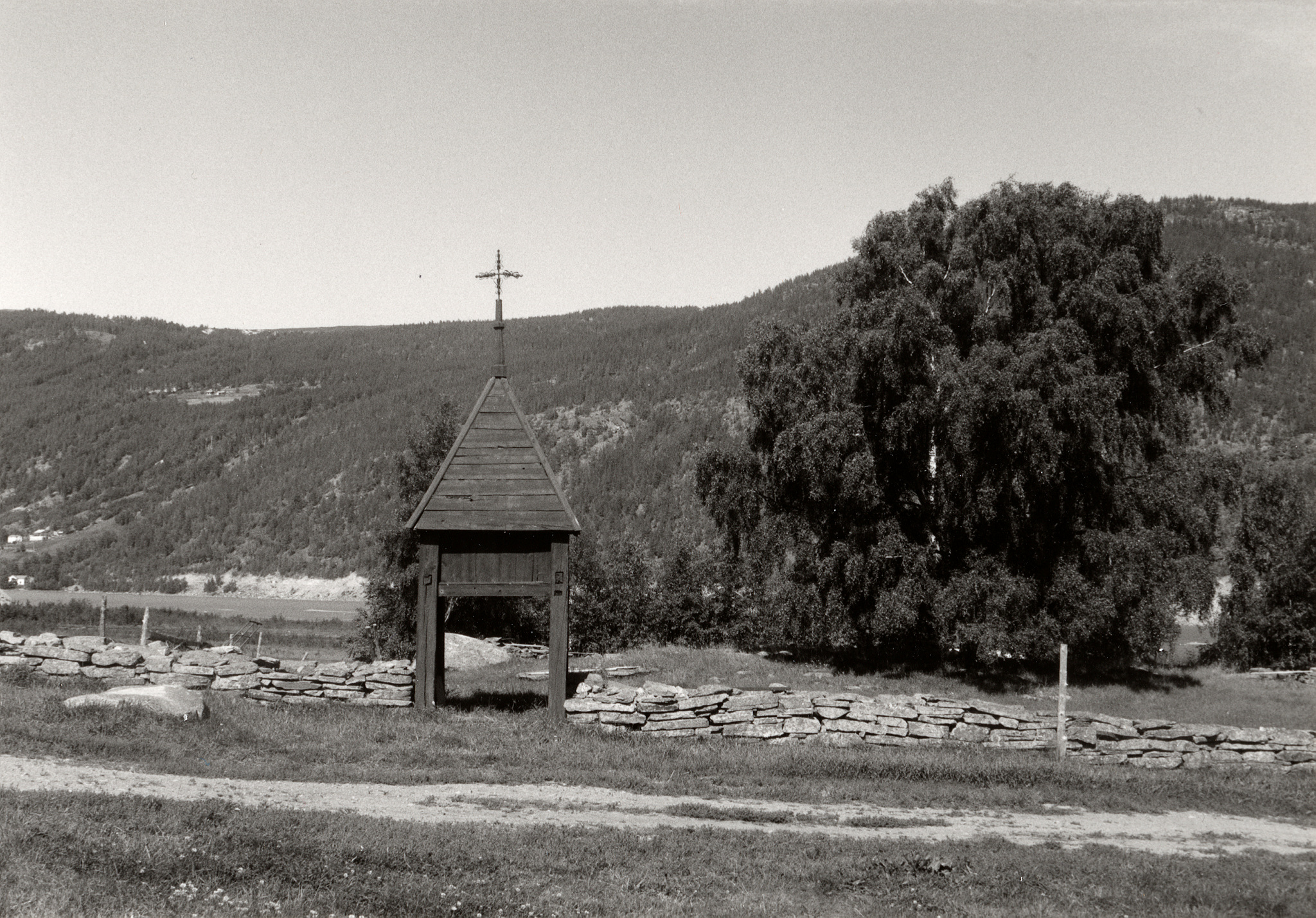 Garmos gamle kirkested, der stavkirken stod før den ble tatt ned og senere gjenoppført på Maihaugen